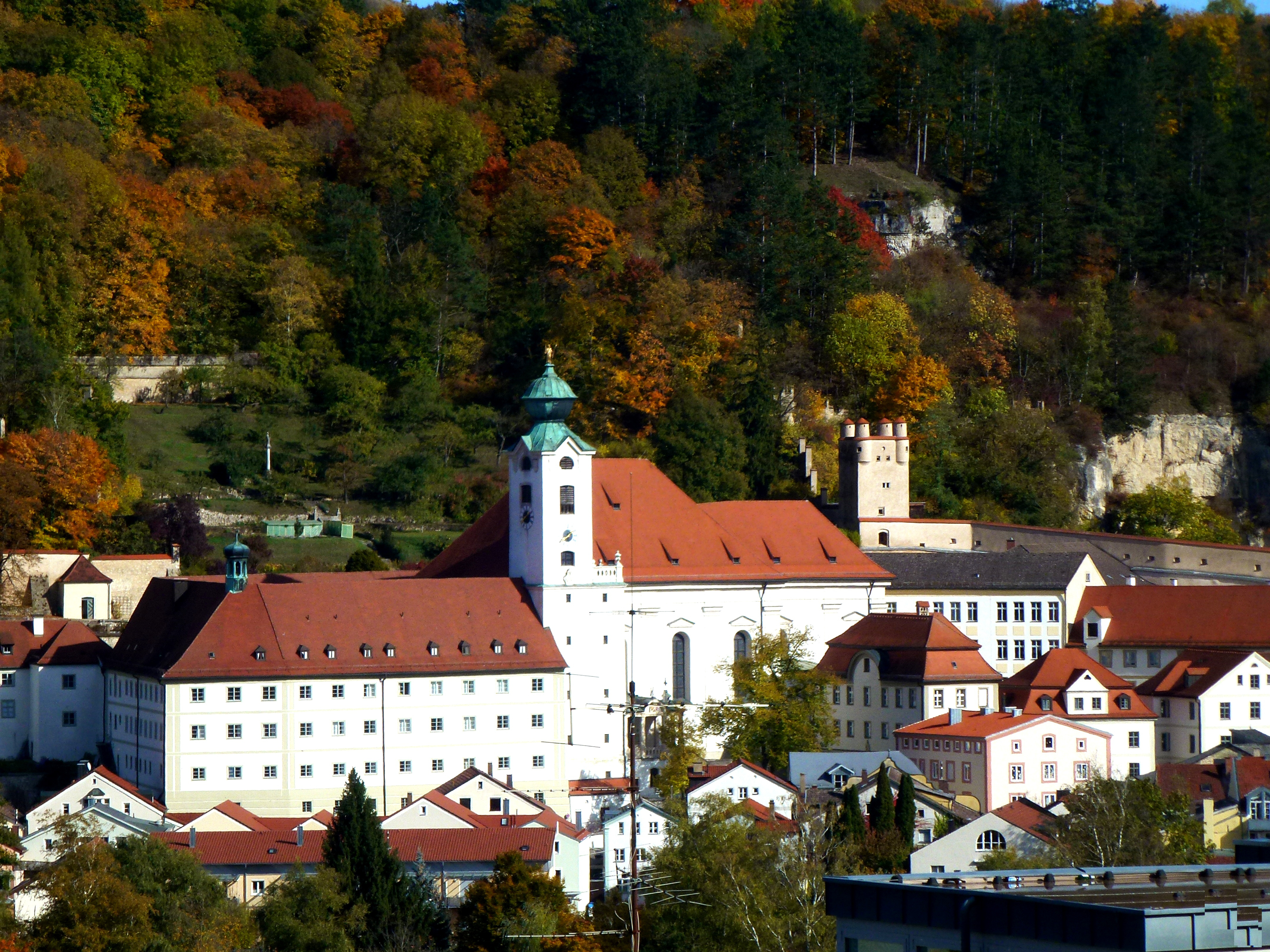 Kath.Benediktinerinnenkloster un Pfarrkirche St.WalburgaThis is a photograph of an architectural monument.